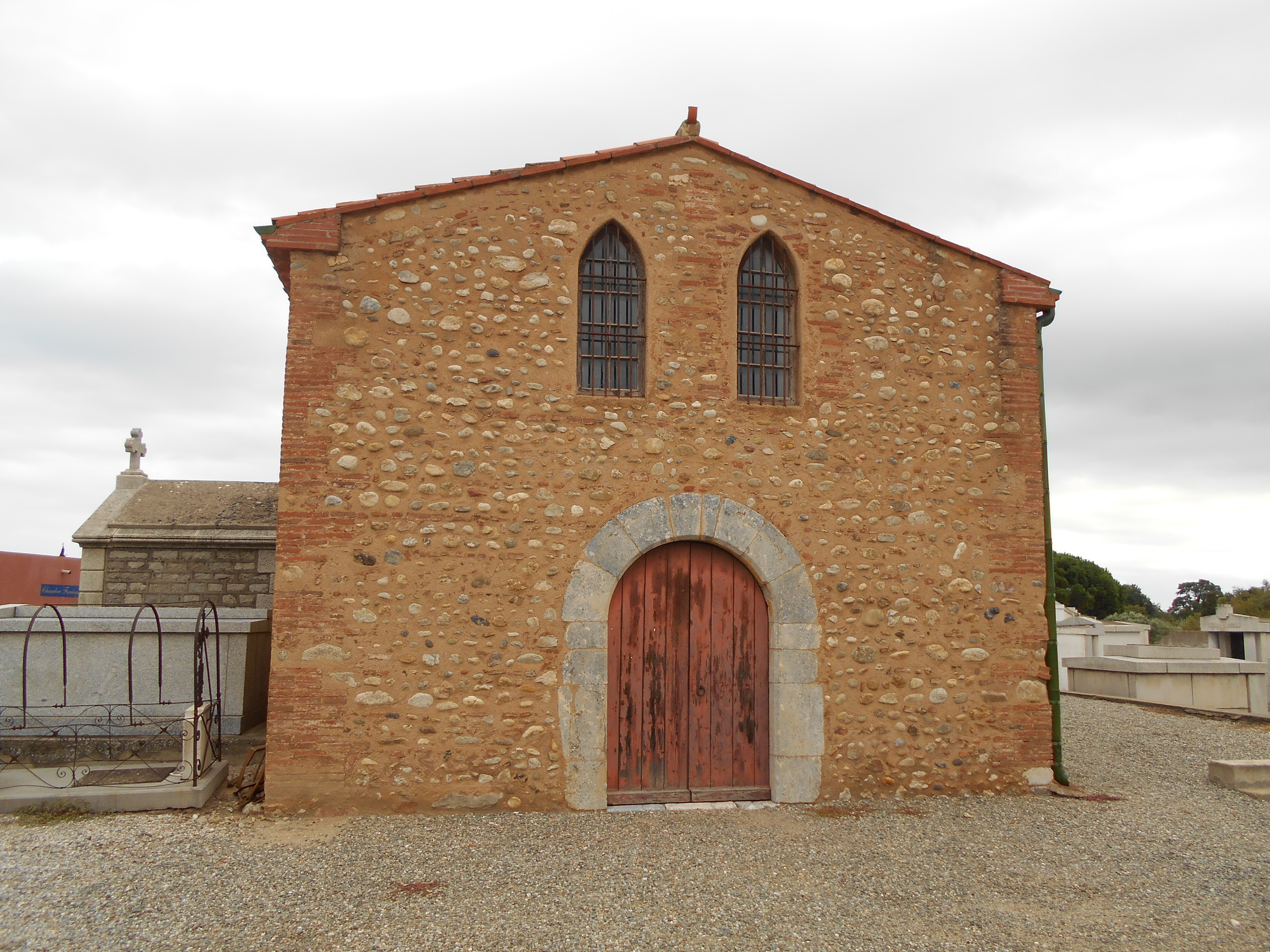 Façana occidental